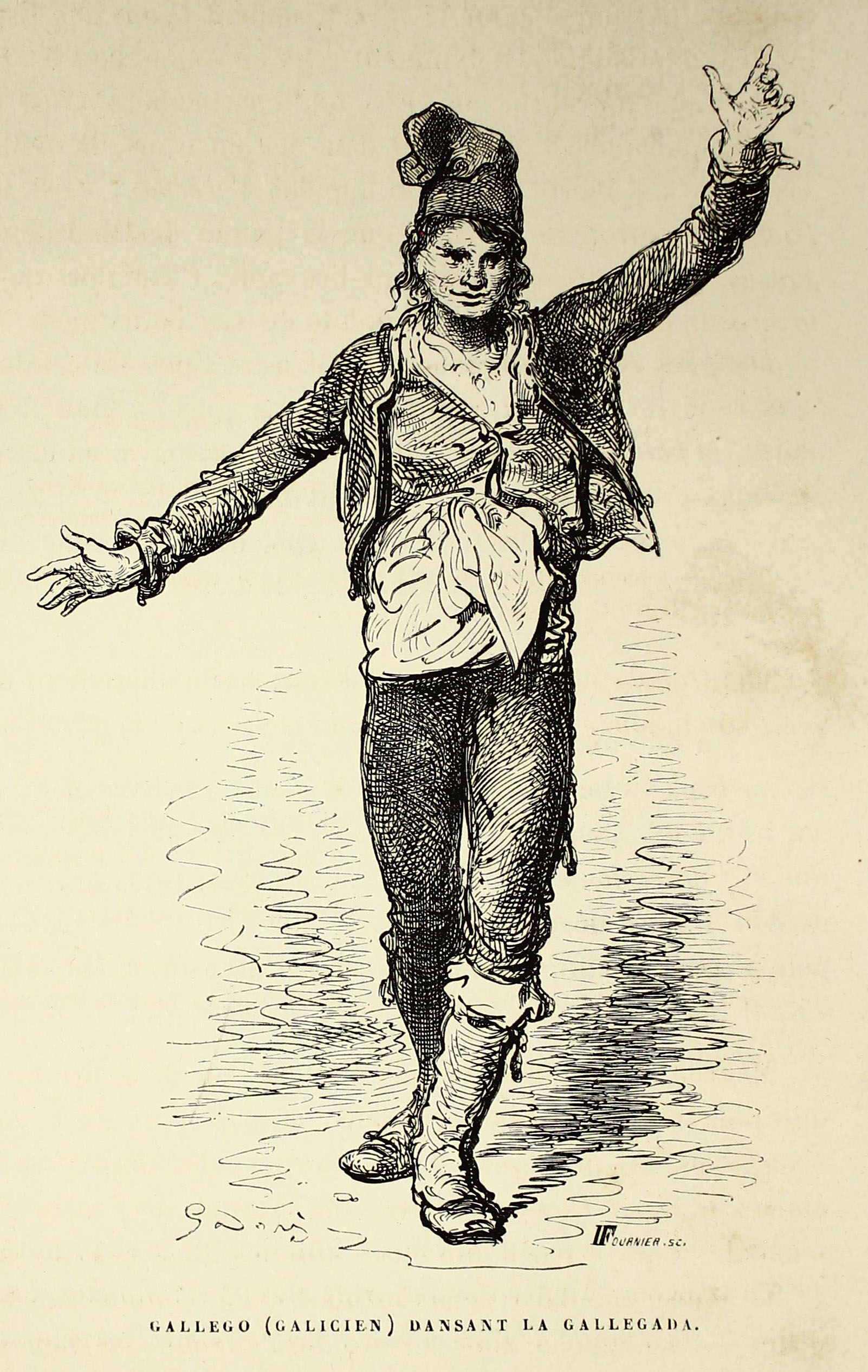 Autor: Davillier, Jean Charles, barón, 1823-1883 Descripción bibliográfica: L'Espagne / par Le Baron CH. Davillier ; ilustrée de 309 gravures dessinées su bois par Gustave Doré. - Paris : Librairie Hachette, 1874. - 799 p. : il. Materia: España- Geografía Materia: España- Usos y costumbres Ilustrador: Doré, Gustave, 1832-1883 Editor: Libreria Hachette Lugar de impresión: Francia, París Localización: Libro completo